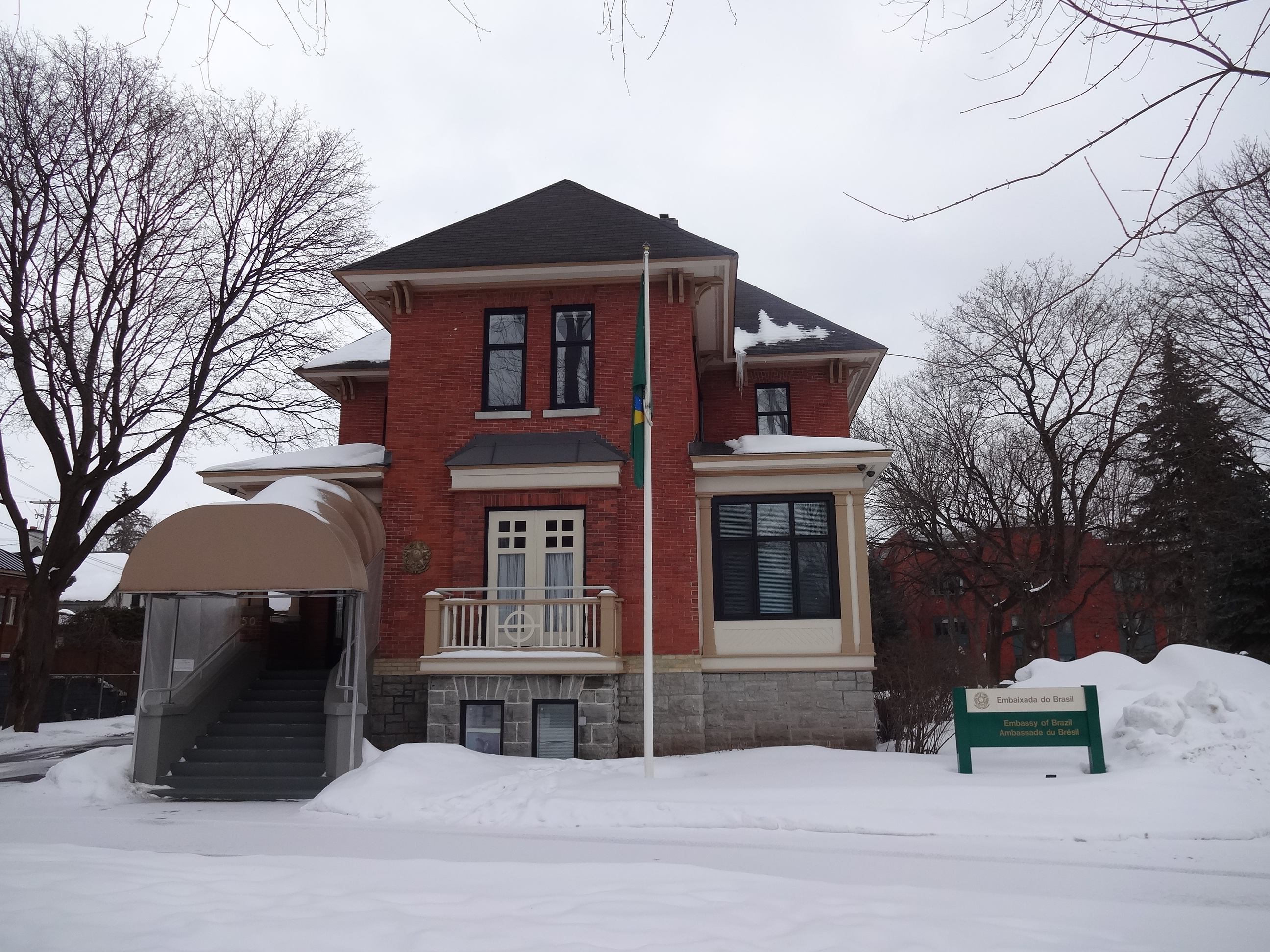 Embaixada do Brasil em Ottawa.